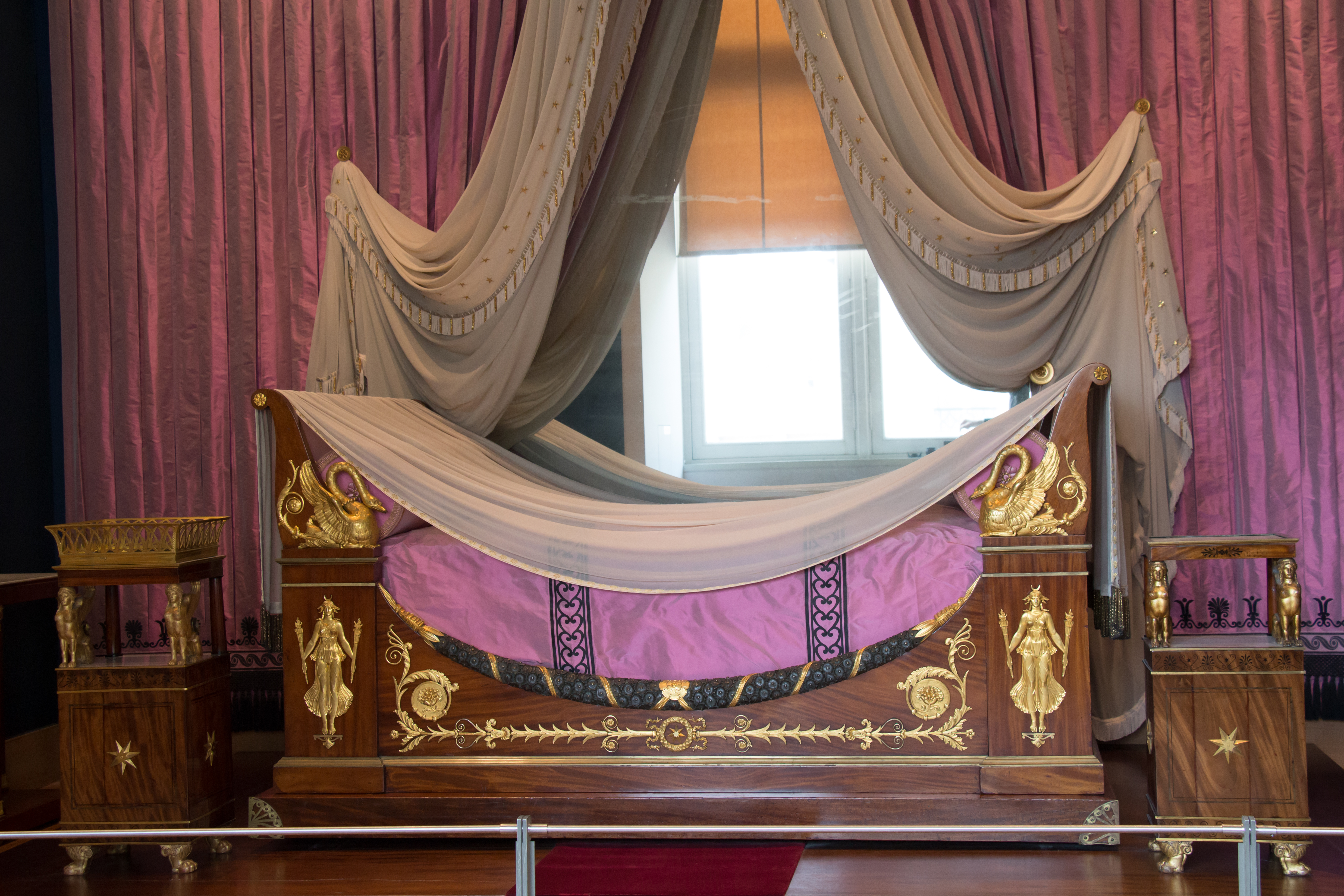 Jacob Frères: Lit de Madame Récamier, vers 1799, Paris, acajou, bronze doré et patiné, Chambre de Madame Récamier, aile Richelieu, 1er étage, Salle 69, Musée du Louvre, Paris, France.